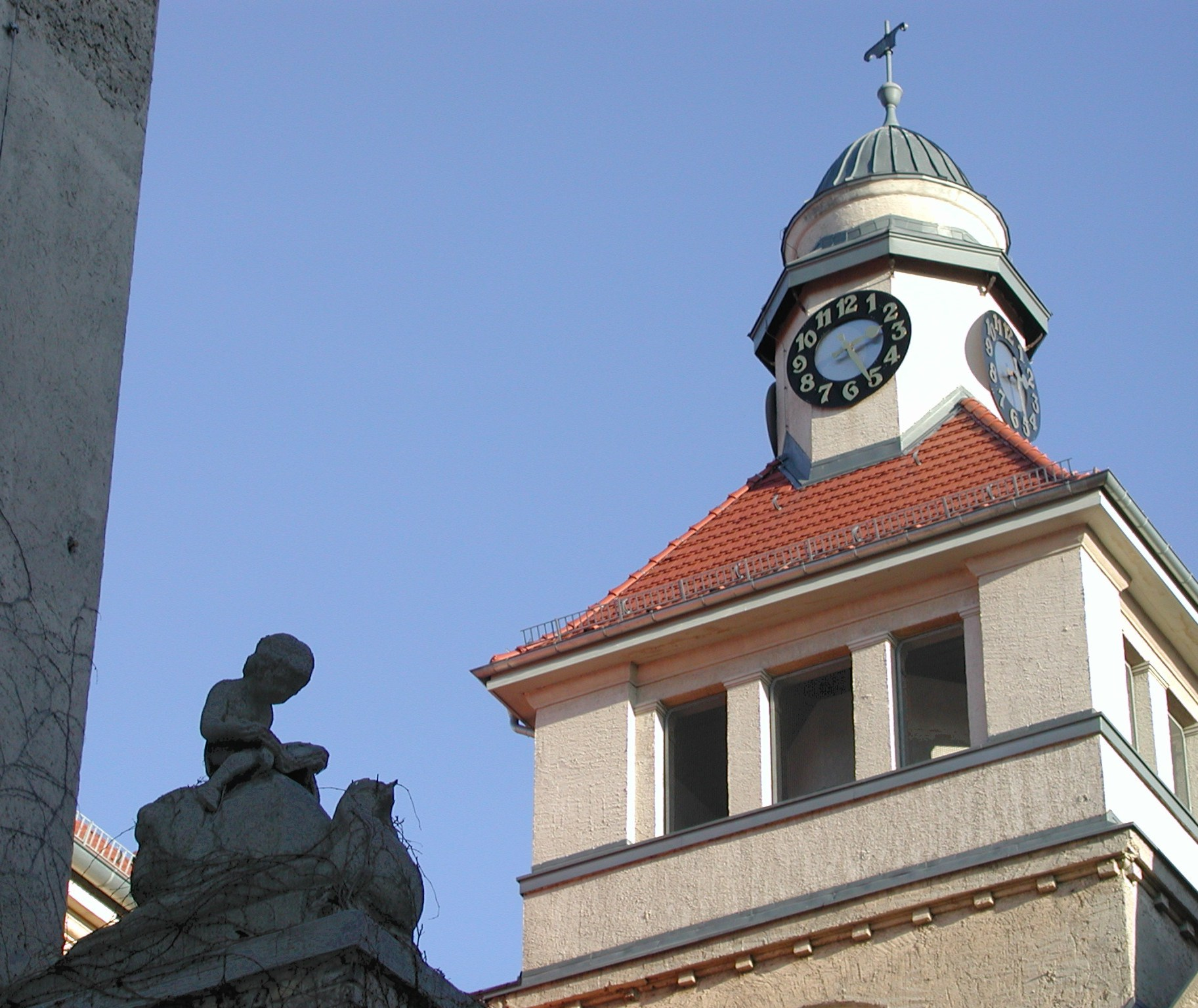 "Kant-Gymnasium" in der Lückstraße: Uhrenturm und Schüler auf Schnecke